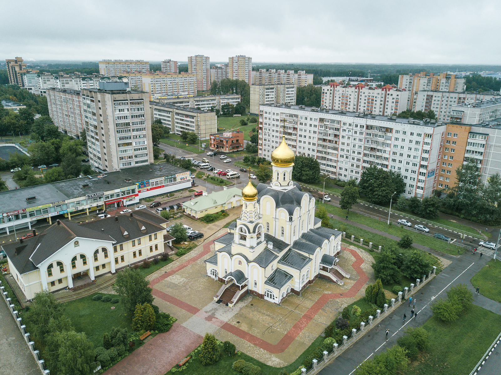 Храм Рождества Христова в Обнинске в окружении домов